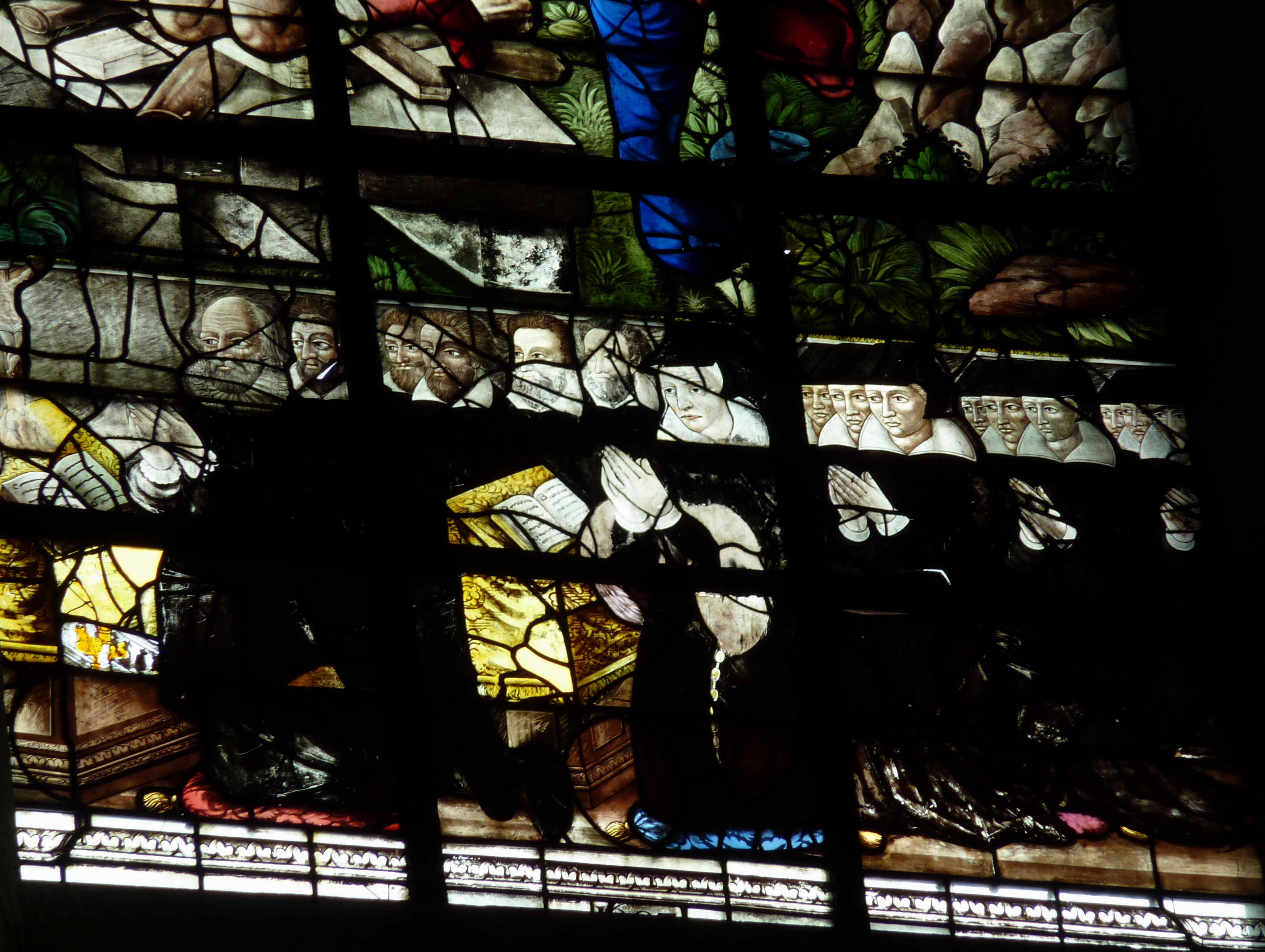 Katholische Kirche Saint-Pierre in Dreux im Département Eure-et-Loir (Centre-Val de Loire/Frankreich), Bleiglasfenster mit der Jahreszahl 1607 in der Stefanuskapelle; Darstellung: Opferung Isaaks; Ausschnitt unten: Stifter